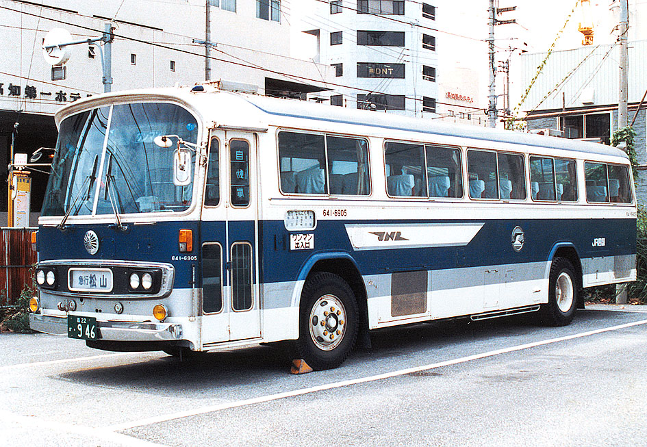 JR四国 なんごく号 いすゞBU20KP 富士重車体